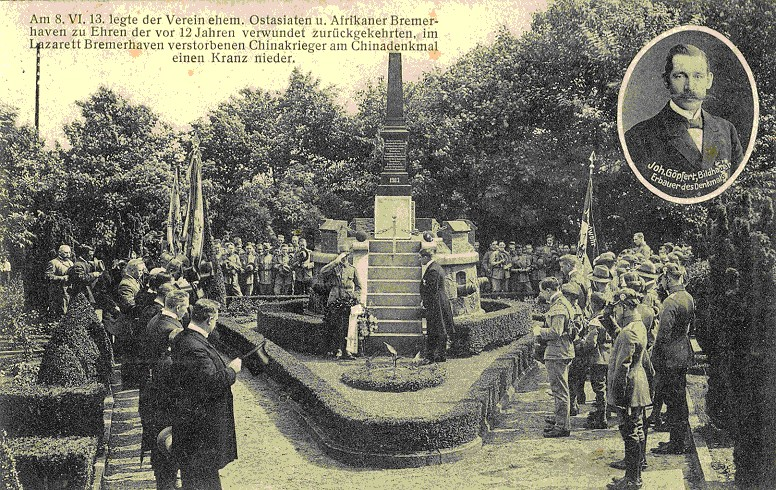 Kranzniederlegung am Denkmal für die im Boxer-Aufstand gefallenen Soldaten aus Bremerhaven. Die Arbeiten des (nicht erhaltenen) Unterbaus stammen von der Firma Gebr. Knackstedt aus Geestemünde. Die Steinmetzarbeiten stammen von Johannes Göpfert. Er war eigentlich Steinmetz und lebte in Dresden oder Leipzig. Er erhielt den Auftrag, weil er das günstigste Angebot abgab und sich als Bildhauer vorstellte. Die Kosten wurden durch Spenden von Vereinen gesammelt (Kampfgenossenververein, Kriegervereine, Verein der Kriegskameraden, Vaterländischer Frauenverein). Die eingemauerten Kanonenrohre stammen von Decks der ersten Dampfer des Norddeutschen Lloyd. Vor dem Einbau in das Denkmal standen sie als Prellsteine vor der alten Lloydhalle.